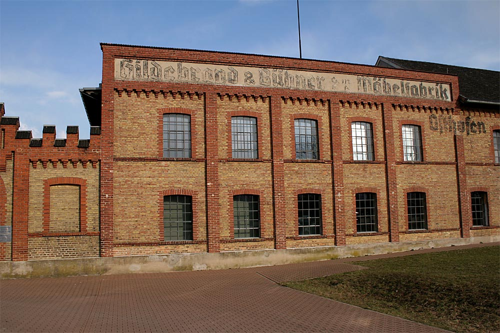 KZ Osthofen, NS-Dokumentationszentrum, Vorderansicht, Hans-Dieter Niepötter